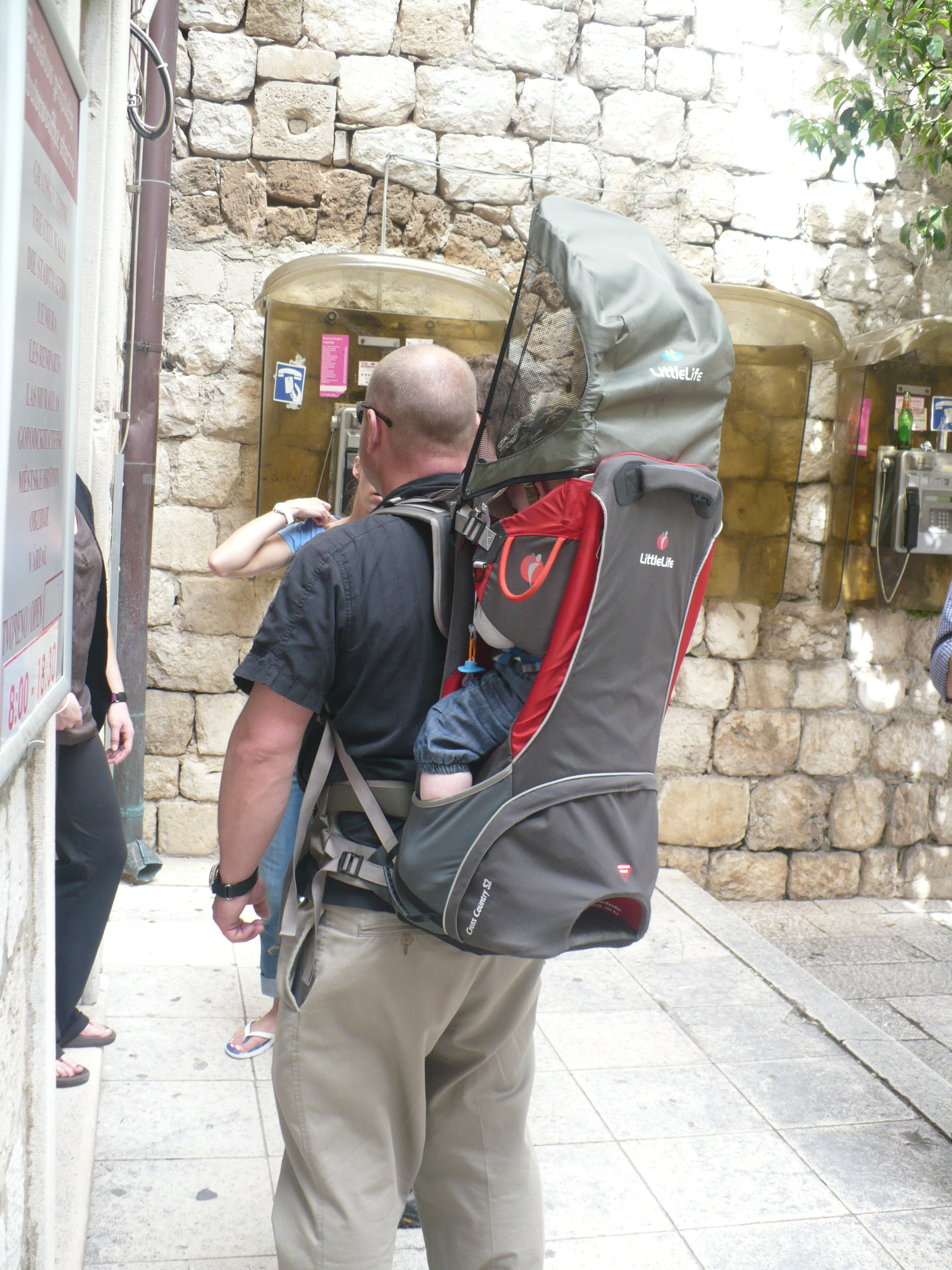 Dubrovnik'ten bir görüntü